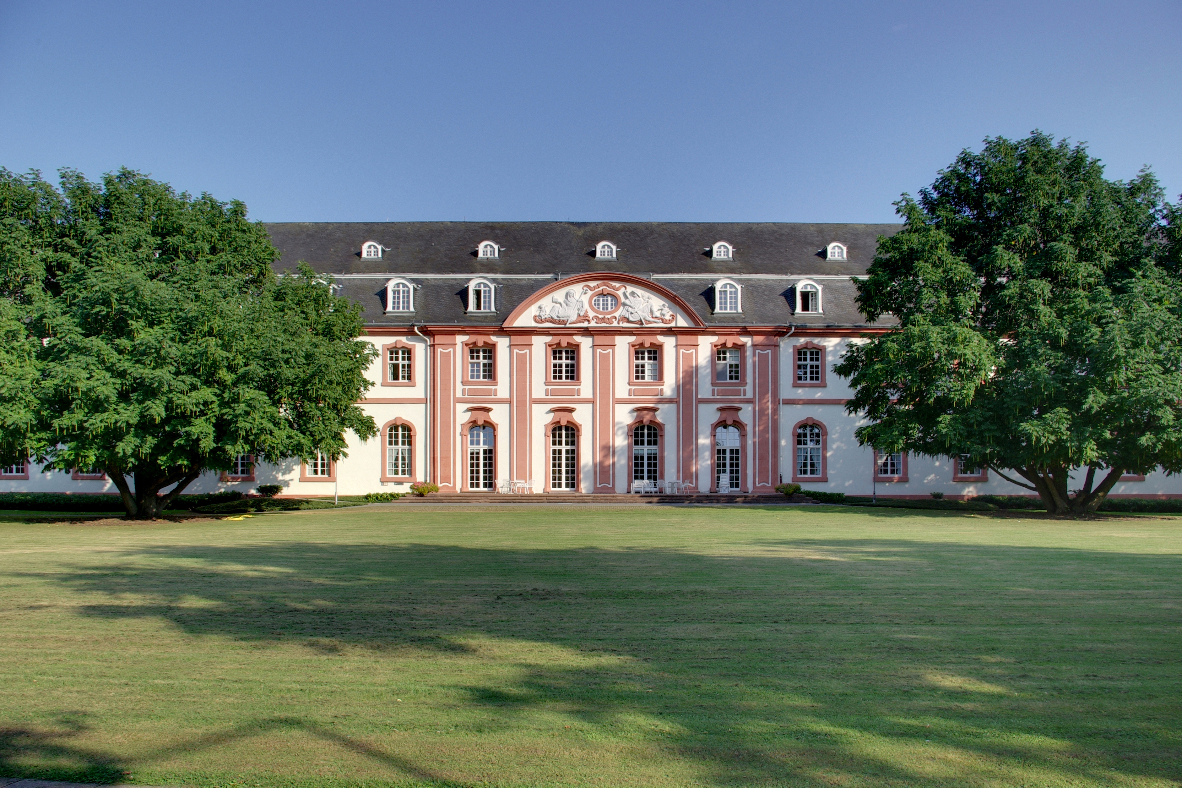 Trier, Westflügel des ehm. adeligen Benediktinnerinnenklosters St. Irminen, um 1740 von Caspar Kretschmar zu Zeiten der Äbtissin Maria von der Beeck erbaut, heute "Vereinigte Hospitien"